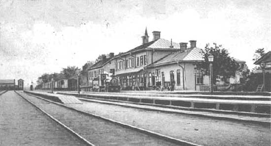 Sala station omkring 1900. Bortåt i bild är i riktning mot Uppsala. Foto efter gammalt vykort, samling Rolf Sten.